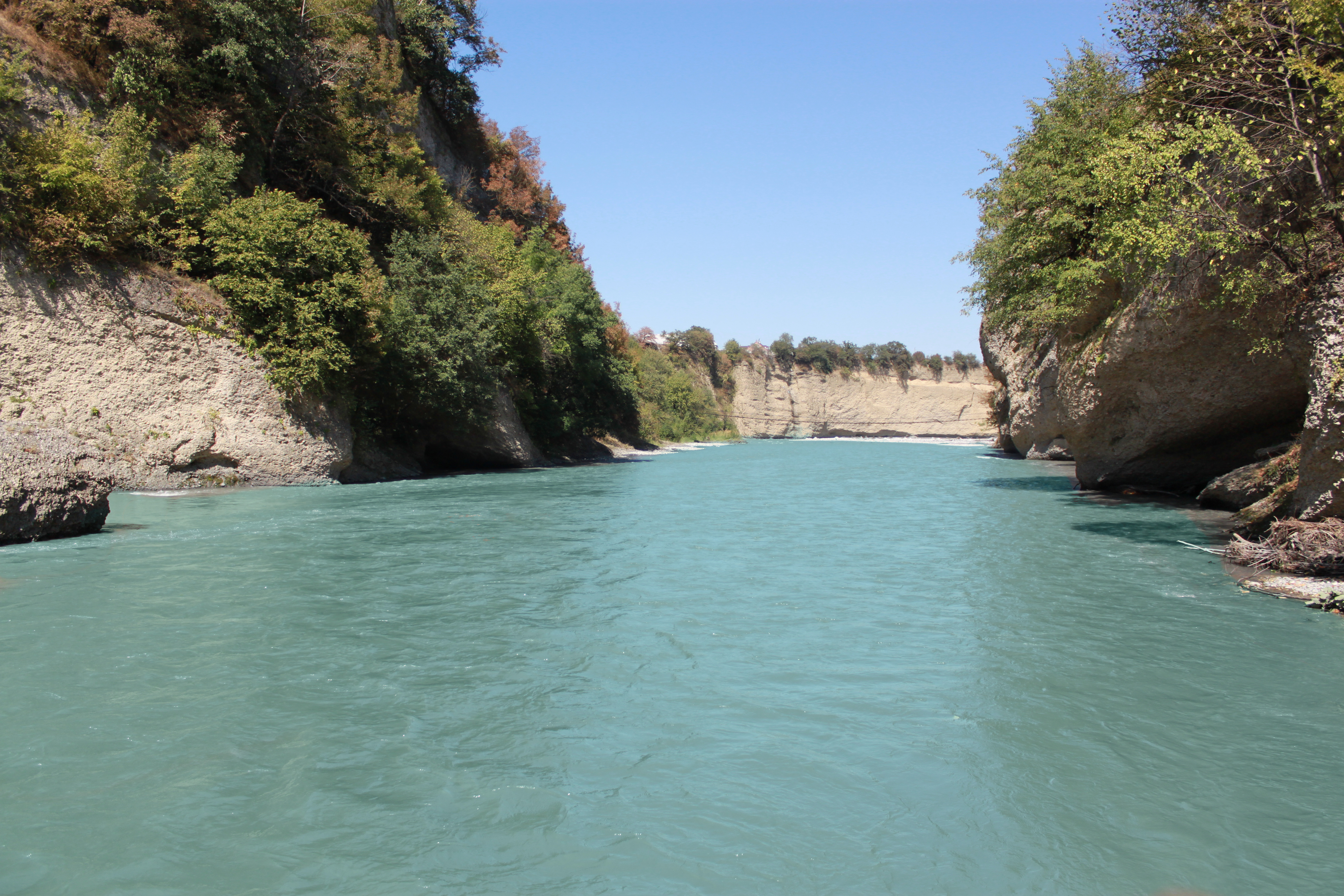 Одно из самых узких мест реки Аргун